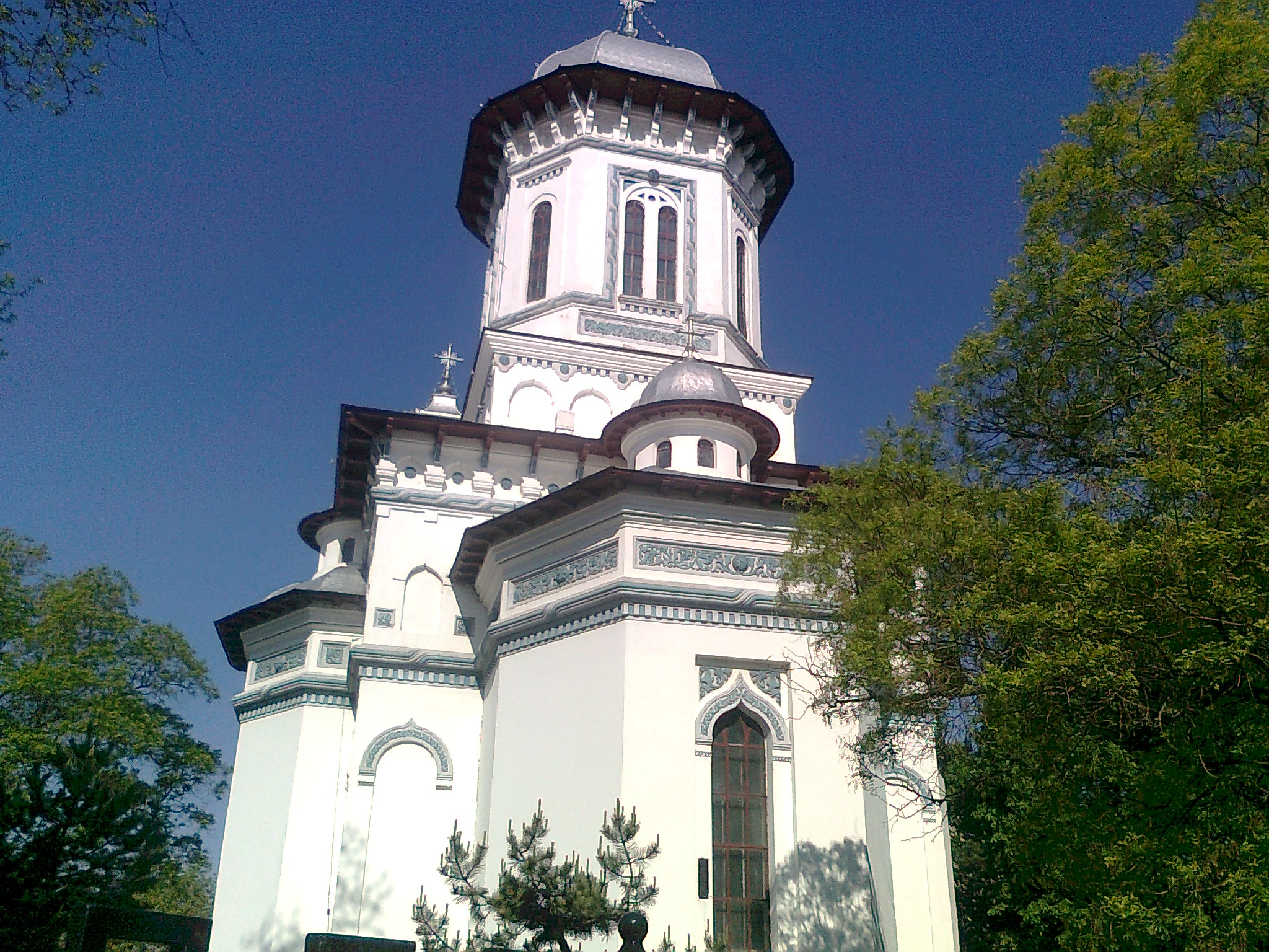 Catedrala Ortodoxă, Alexandria, România